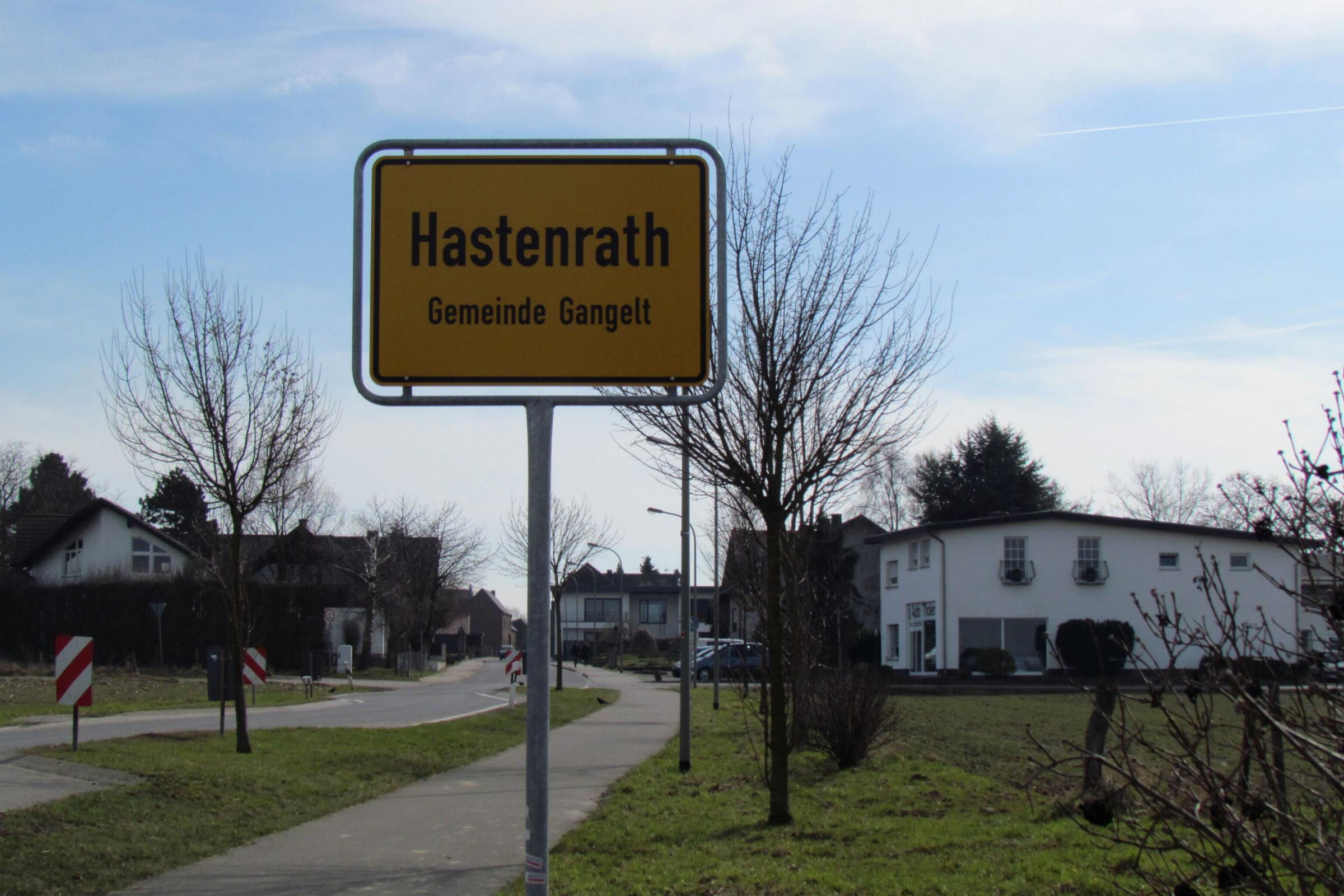 Ortseingang von Hastenrath